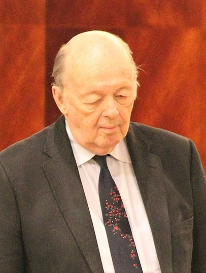 Iivo Nei